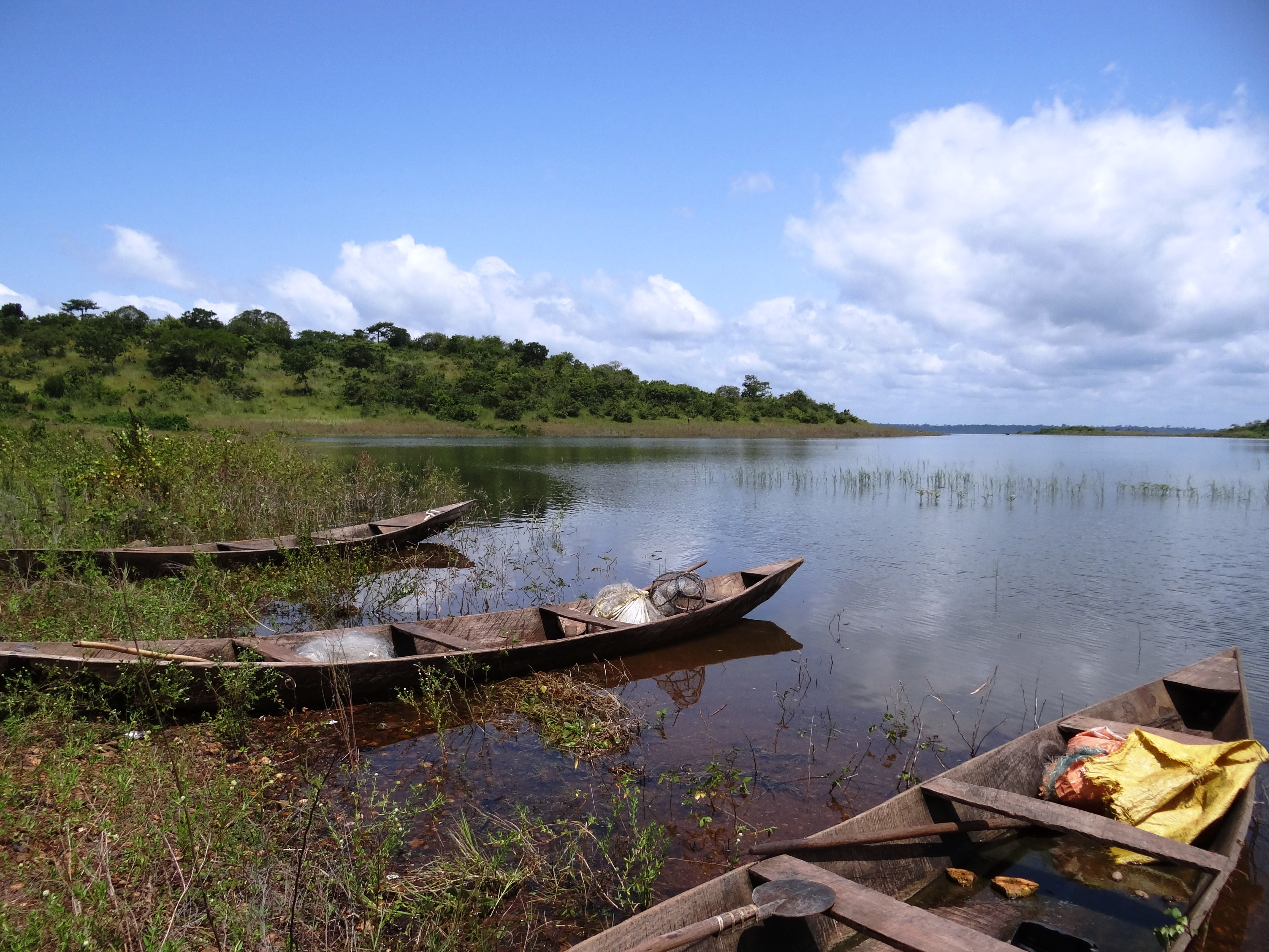 דייג באגם קוסו ליד סכר קוסו בחוף השנהב This is an image of food from Ivory Coast